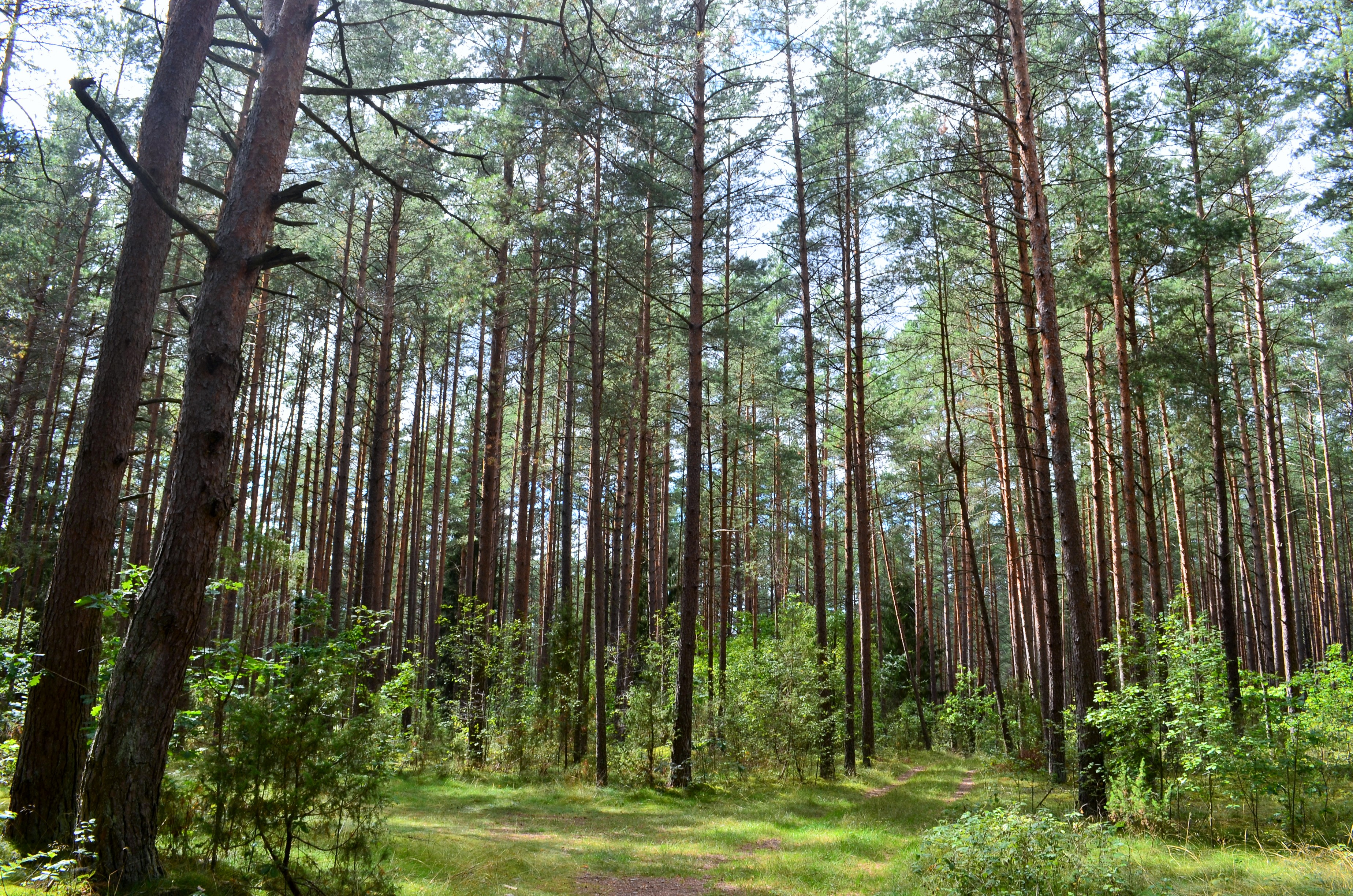 Subartonių miškai netoli Gelovinės, Varėnos raj.